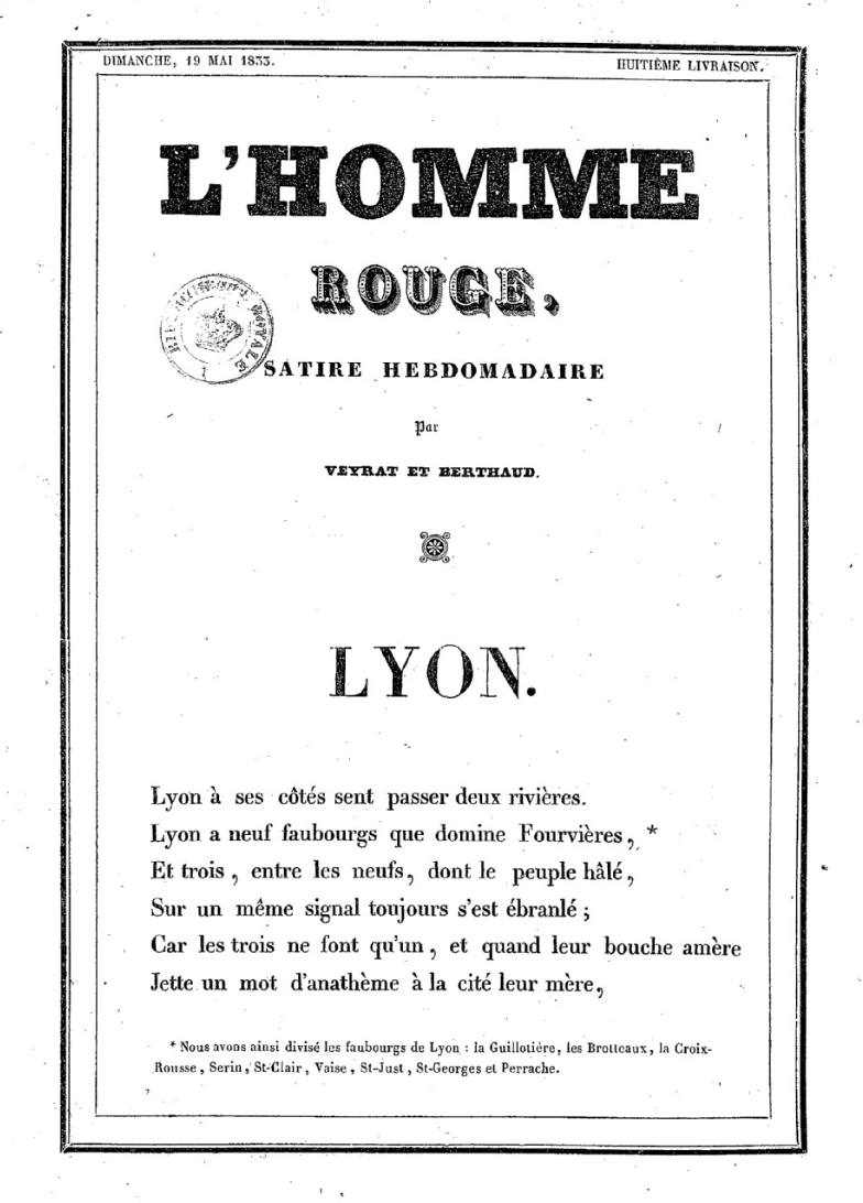 Louis-Agathe BERTHAUD et Jean-Pierre VEYRAT, satire "L'Homme Rouge" exposée au Musée Gadagne (Lyon)